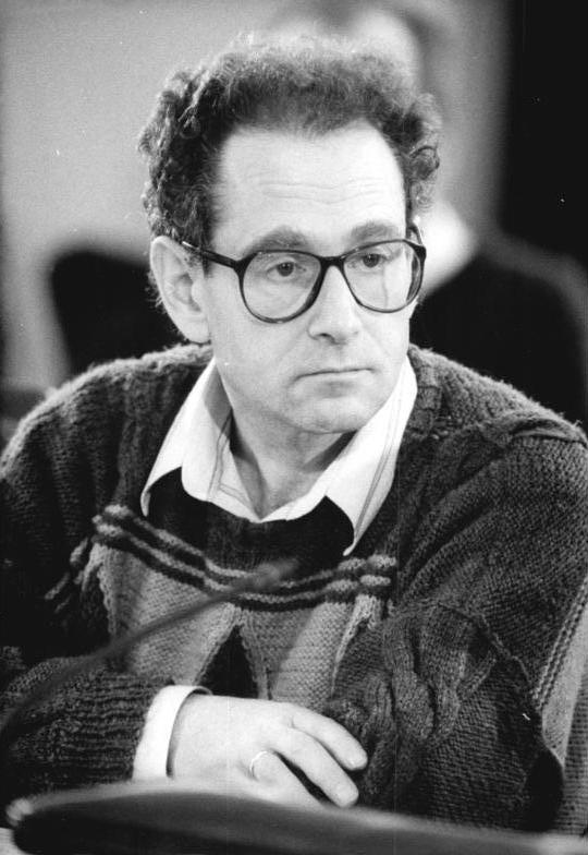 ADN-ZB Mittelstädt-24.1.90-zei-Berlin: Konrad Weiß, Demokratie jetzt. Stammabzug darf nicht aus dem Hause